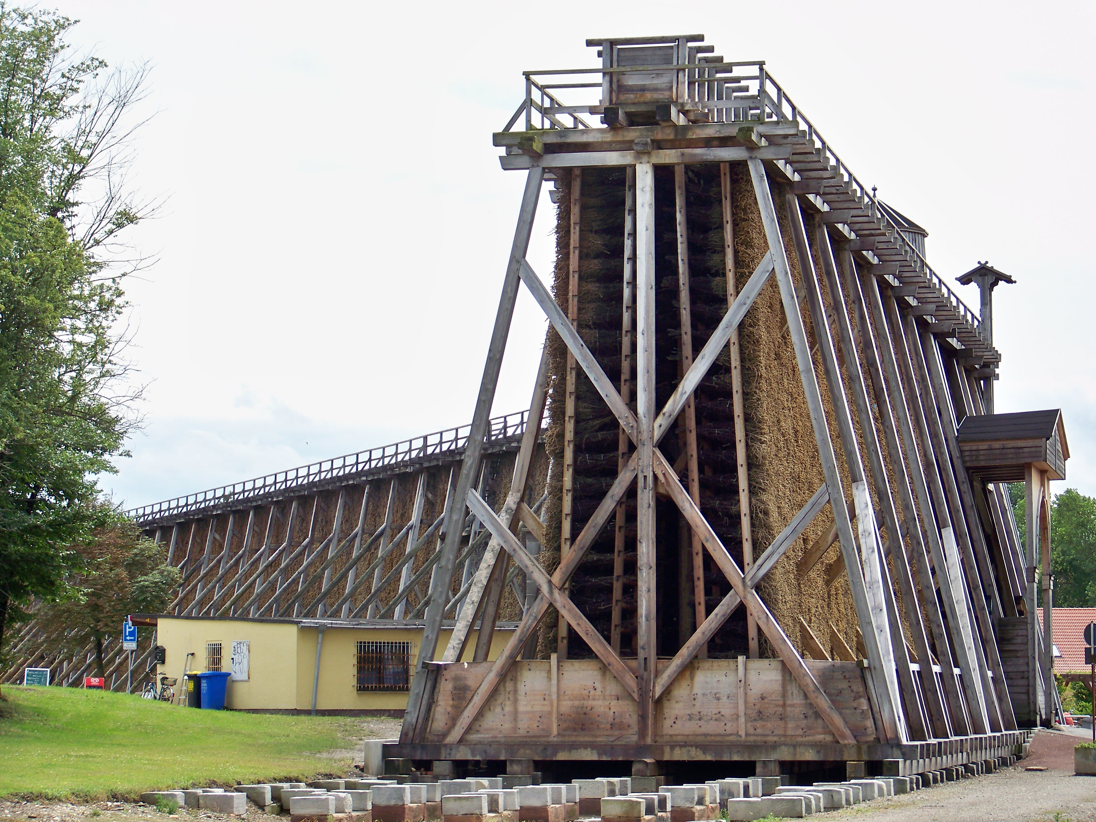 Gradierwerk in Bad Dürrenberg, mit 636 Metern Länge das längste zusammenhängende Gradierwerk Europas